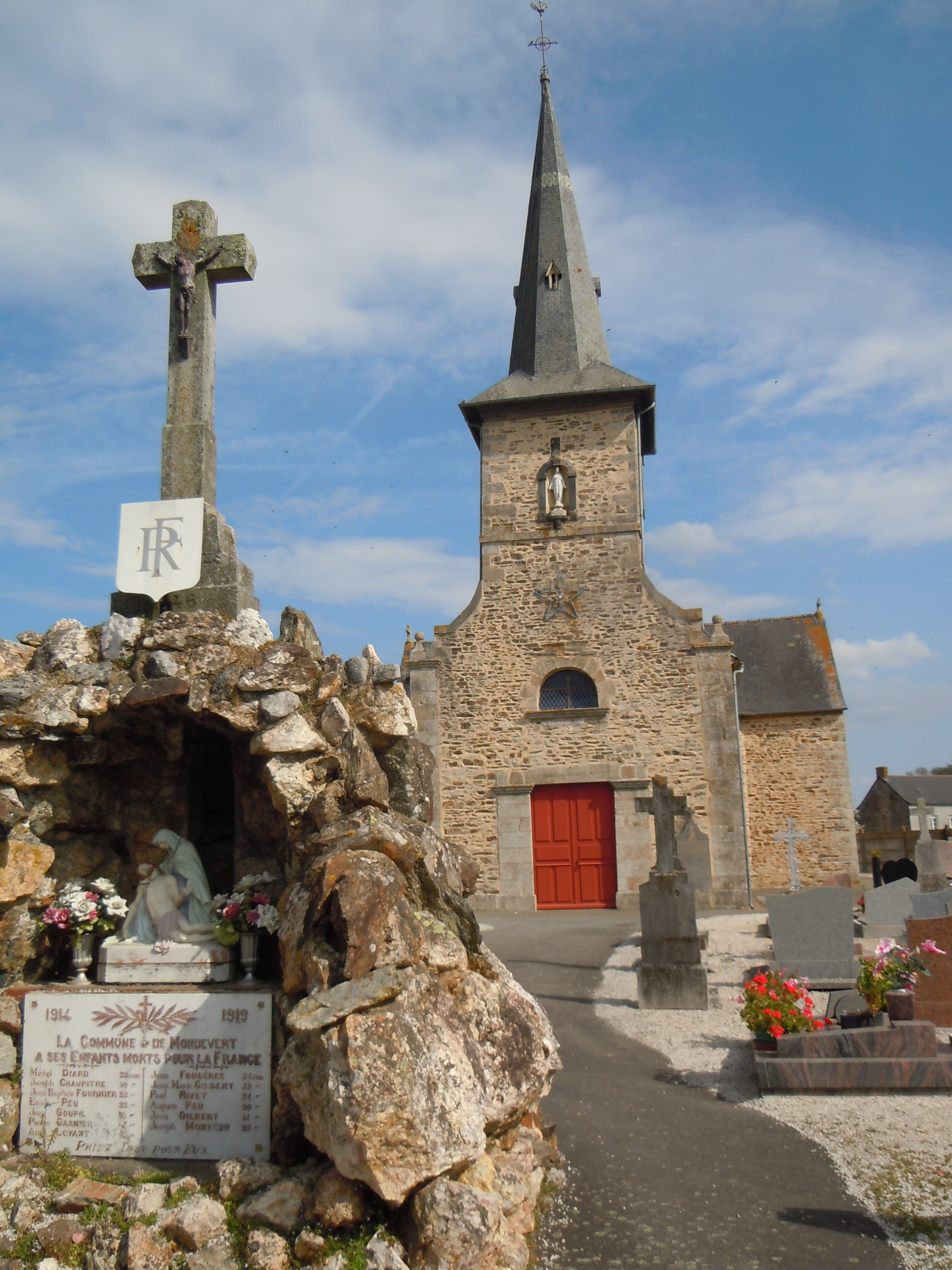 Église Sainte-Marie-Madeleine de Mondevert